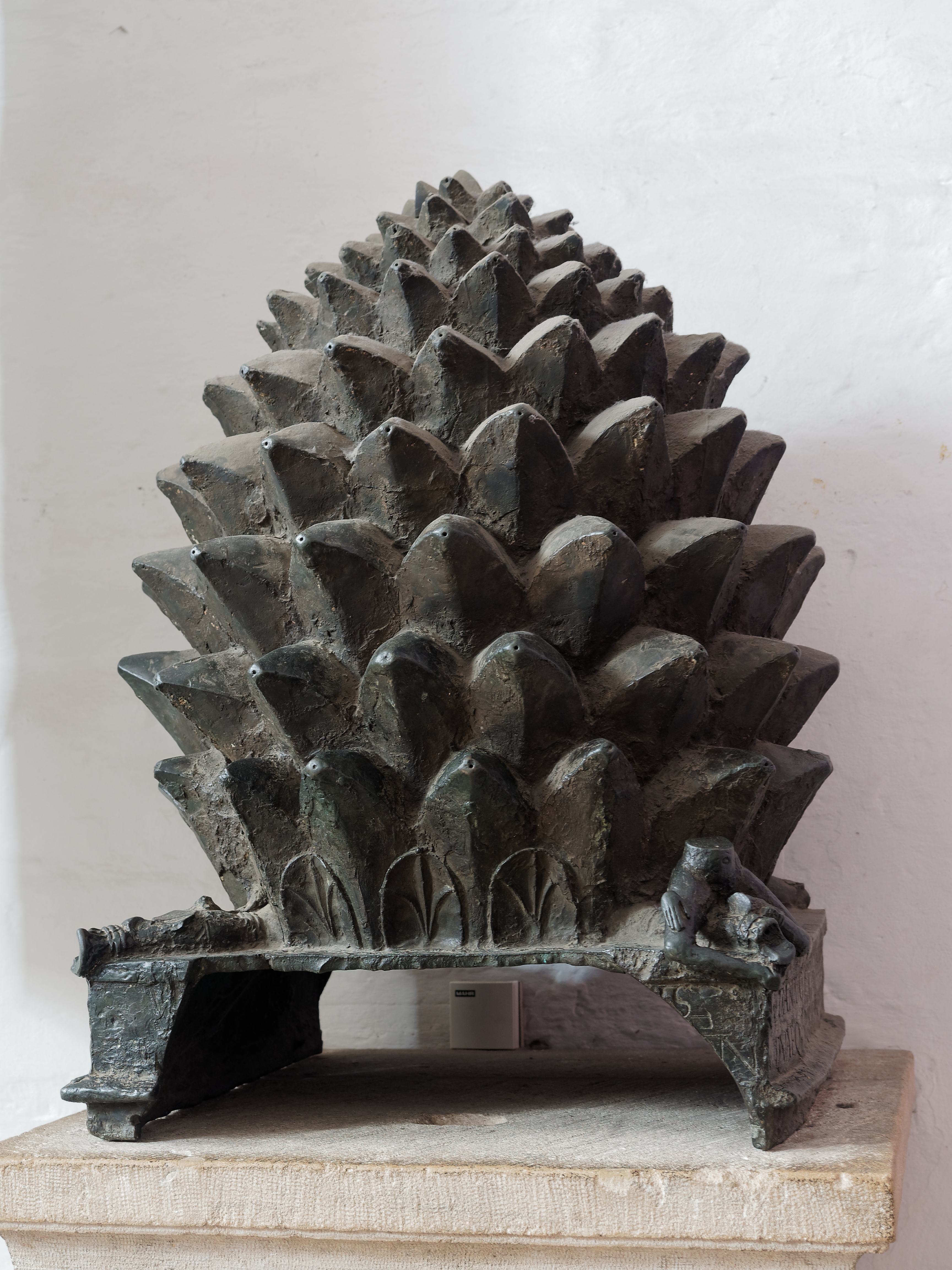 Bronzener Pinienzapfen in der Vorhalle im Turm im Dom in Aachen, Denkmal